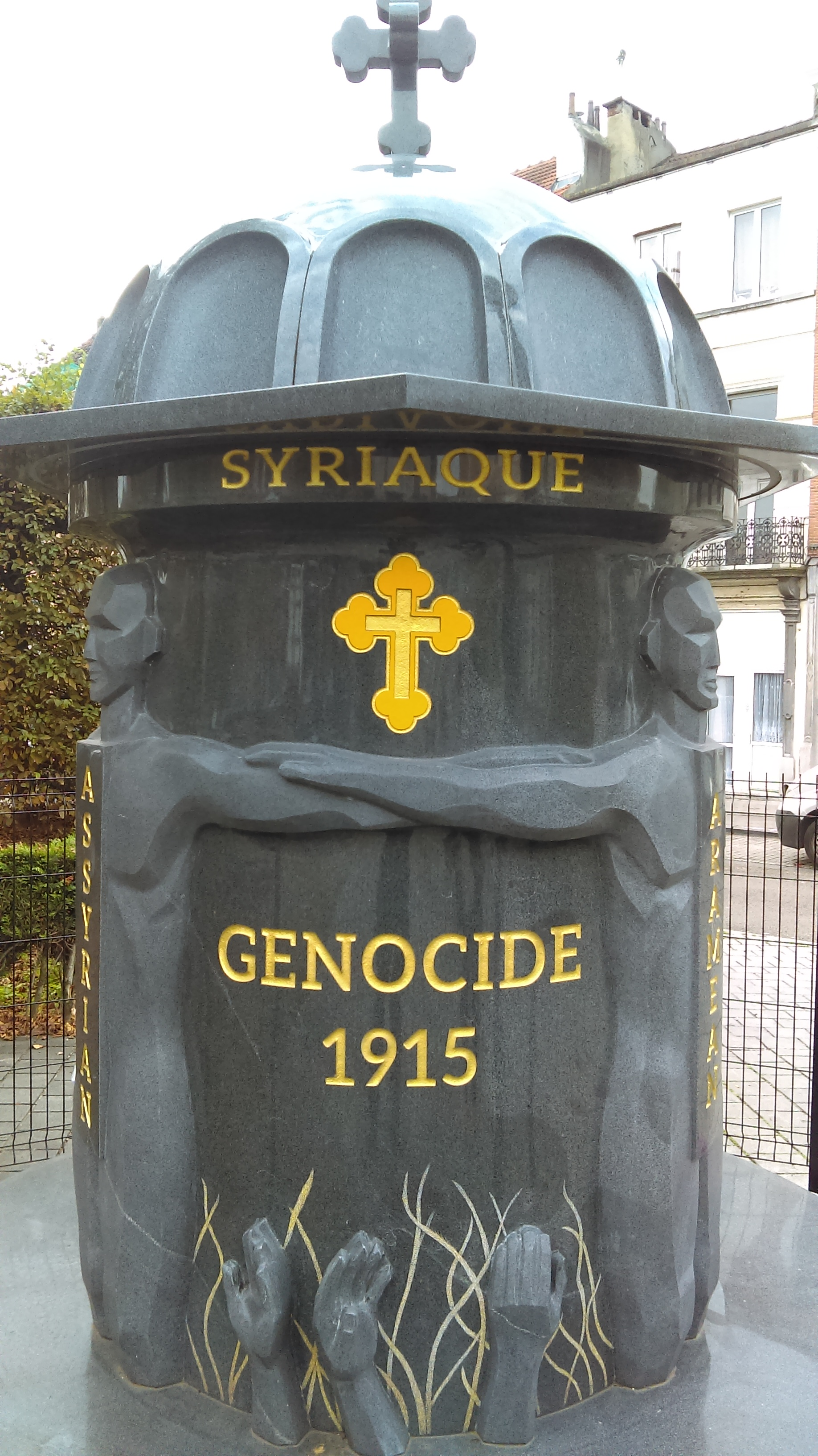 Etterbeek, Place Van Meyel, monument au genocide 1915 (